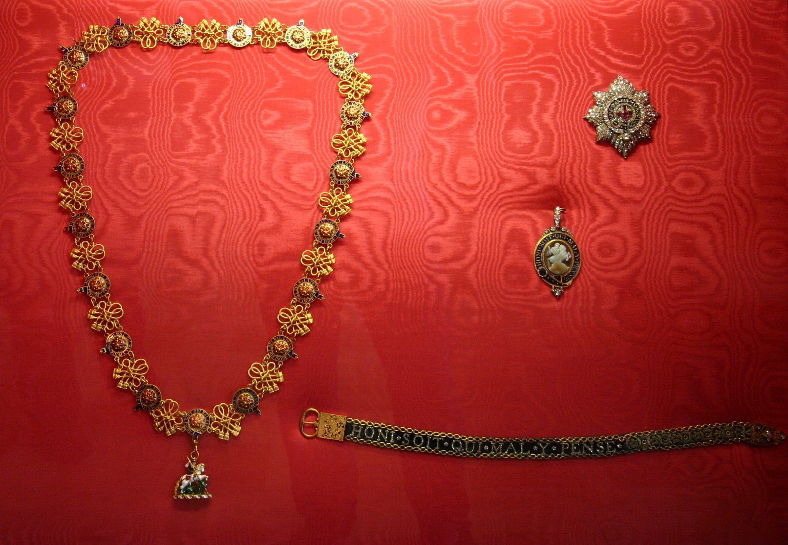 Hosenbandorden eines Mitgliedes des Hauses Sachsen Coburg Gotha